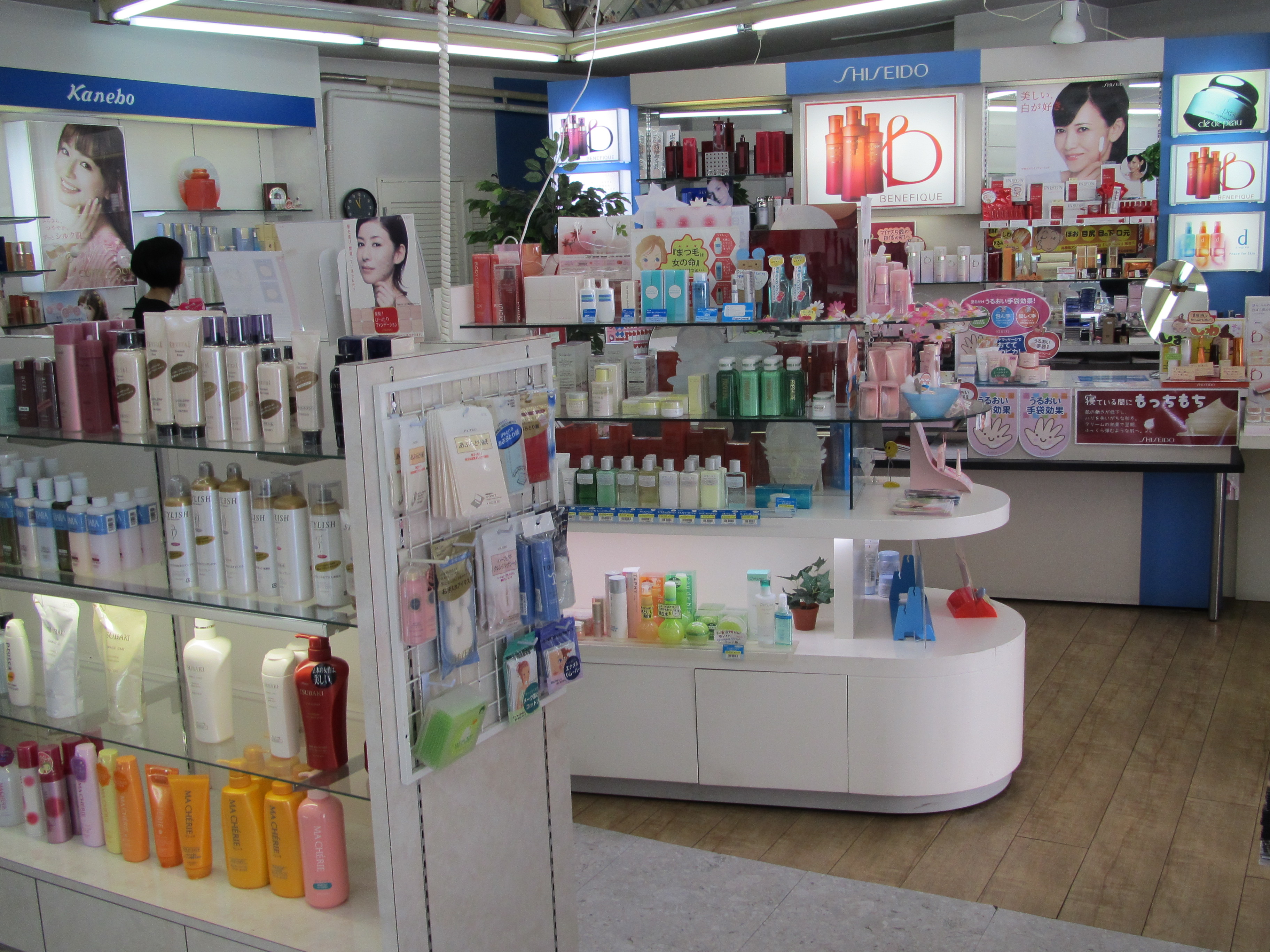 『大丸化粧品店』店内